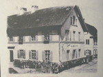 Jüdisches Schulgebäude in Ichenhausen